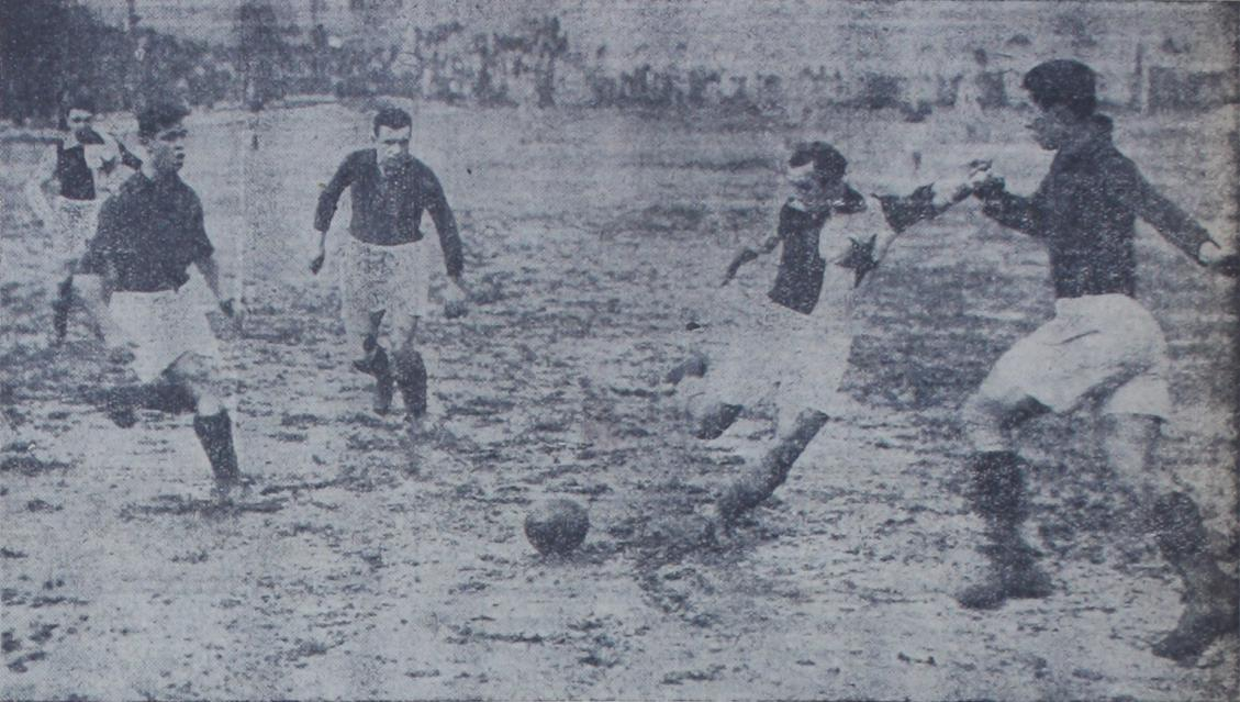 Fenerbahçe-Galatasaray karması ile Slavia Prag maçı, 25 Aralık 1931.